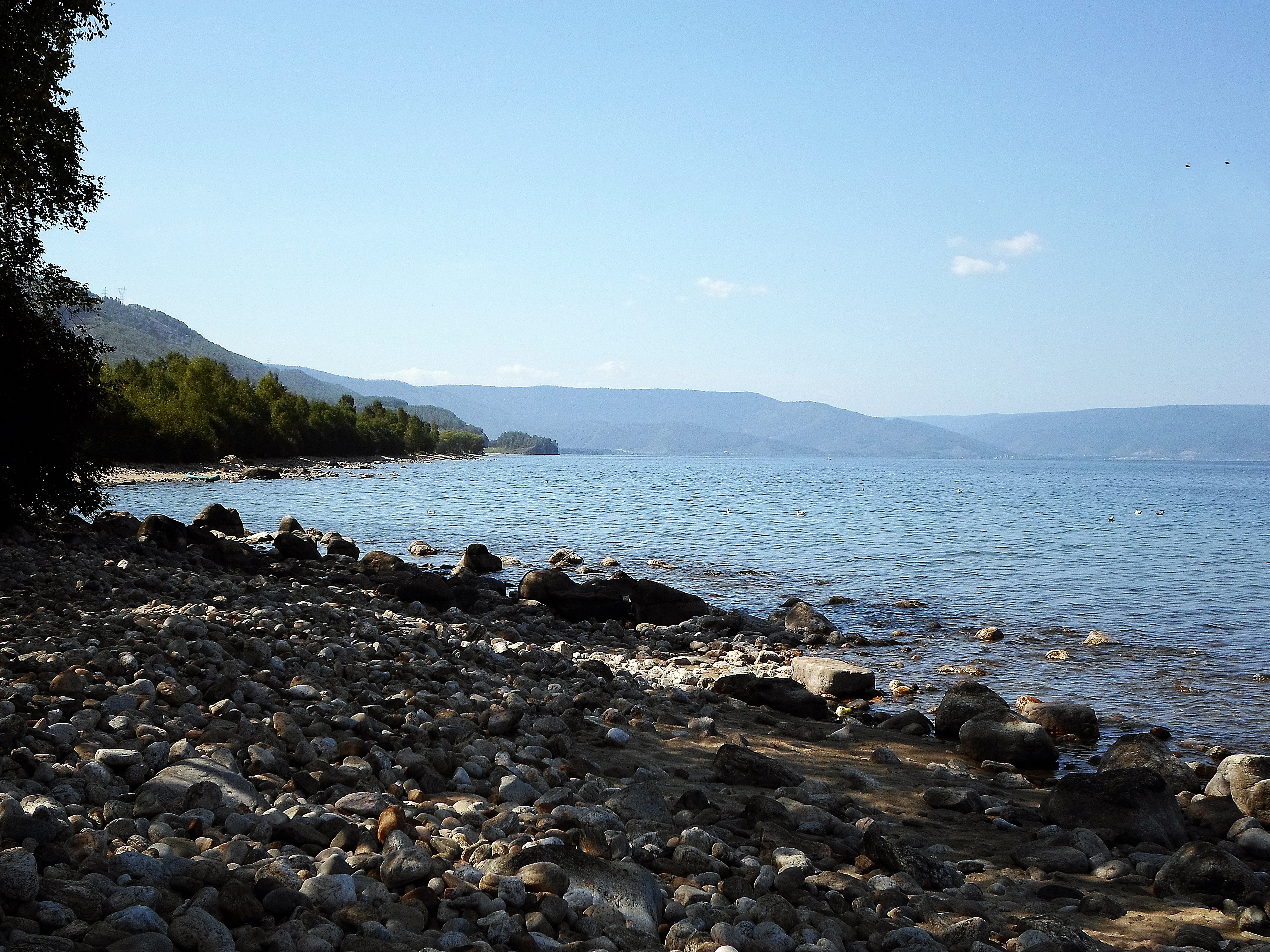 Вид на залив Култук озера Байкал у посёлка Буровщина. Слюдянский район Иркутской области.